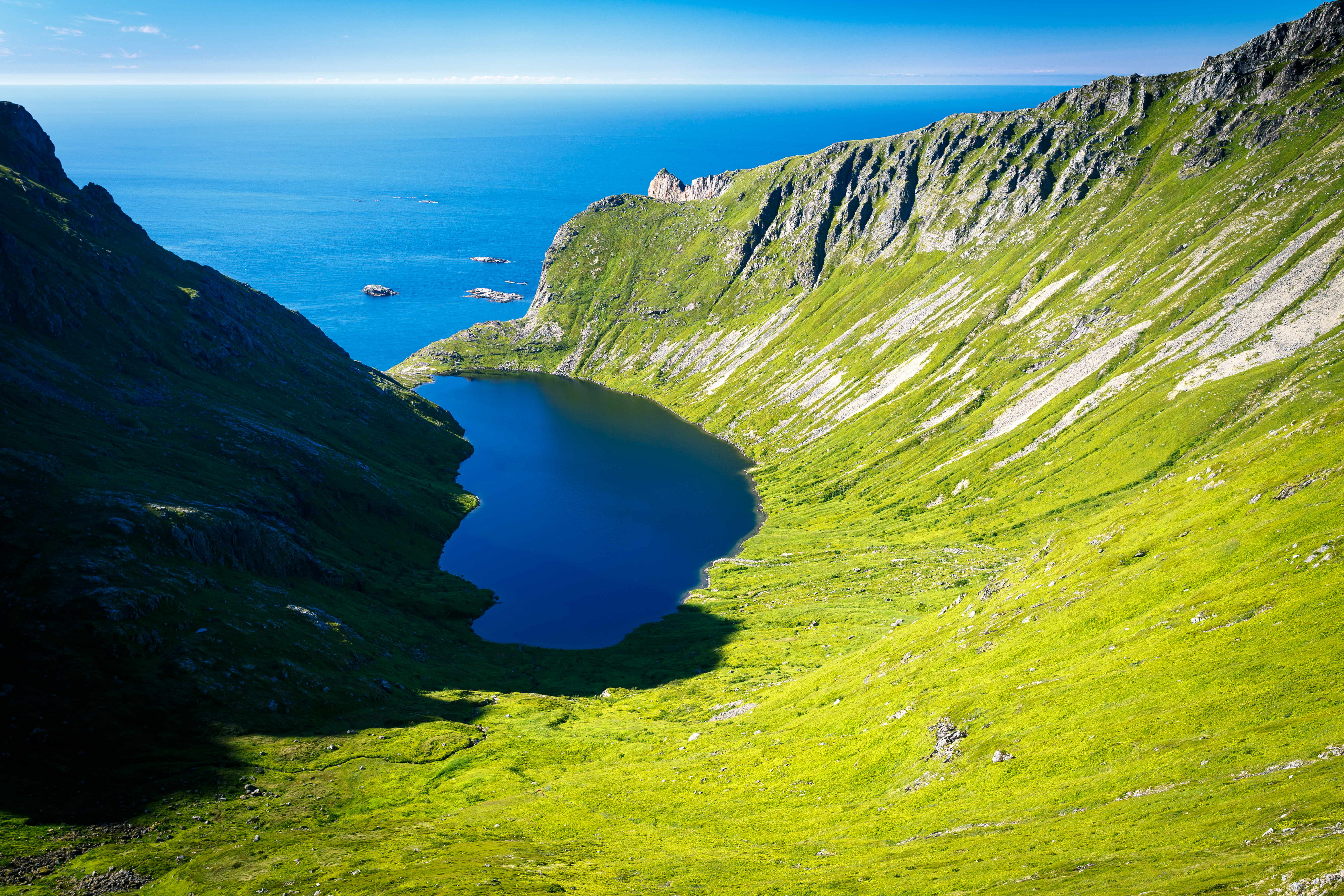 Stokkvikvatnet (45m above sea level)